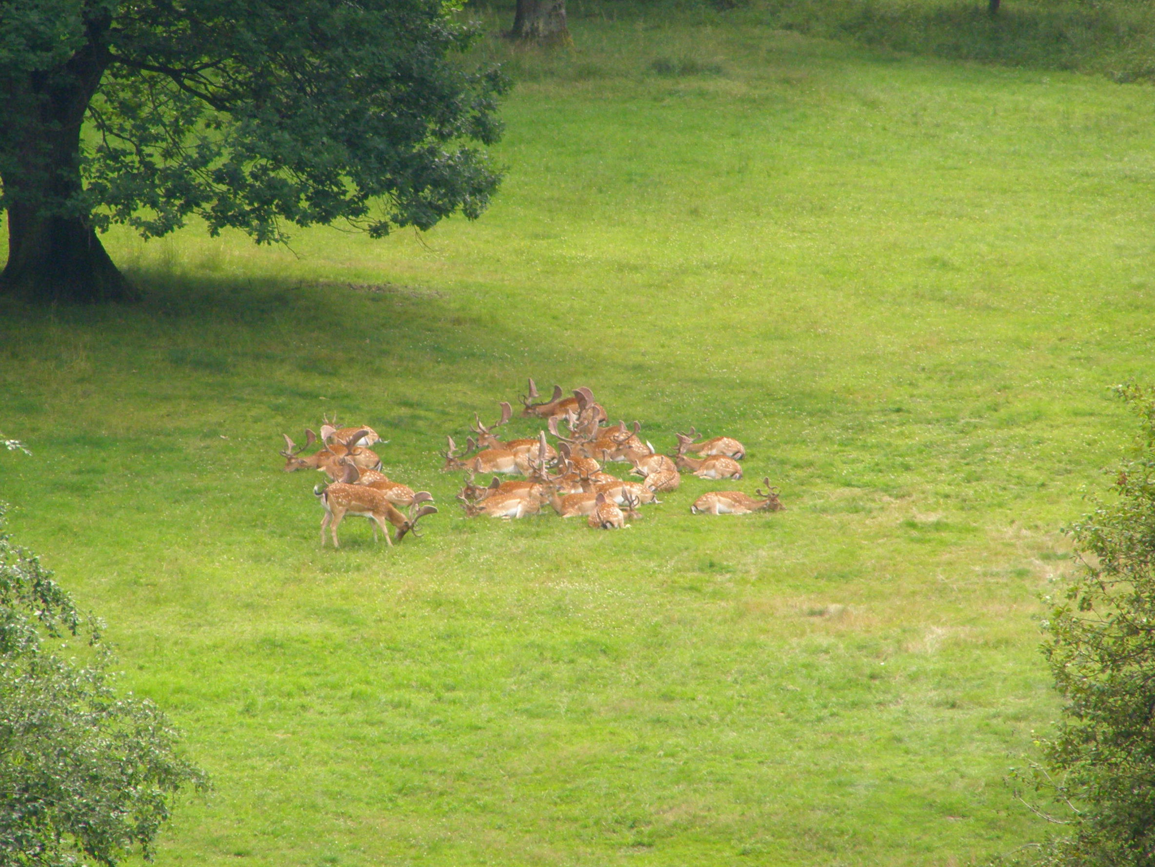 Palkovické hůrky, Přírodní památka Hradní vrch Hukvaldy, stádo daňků